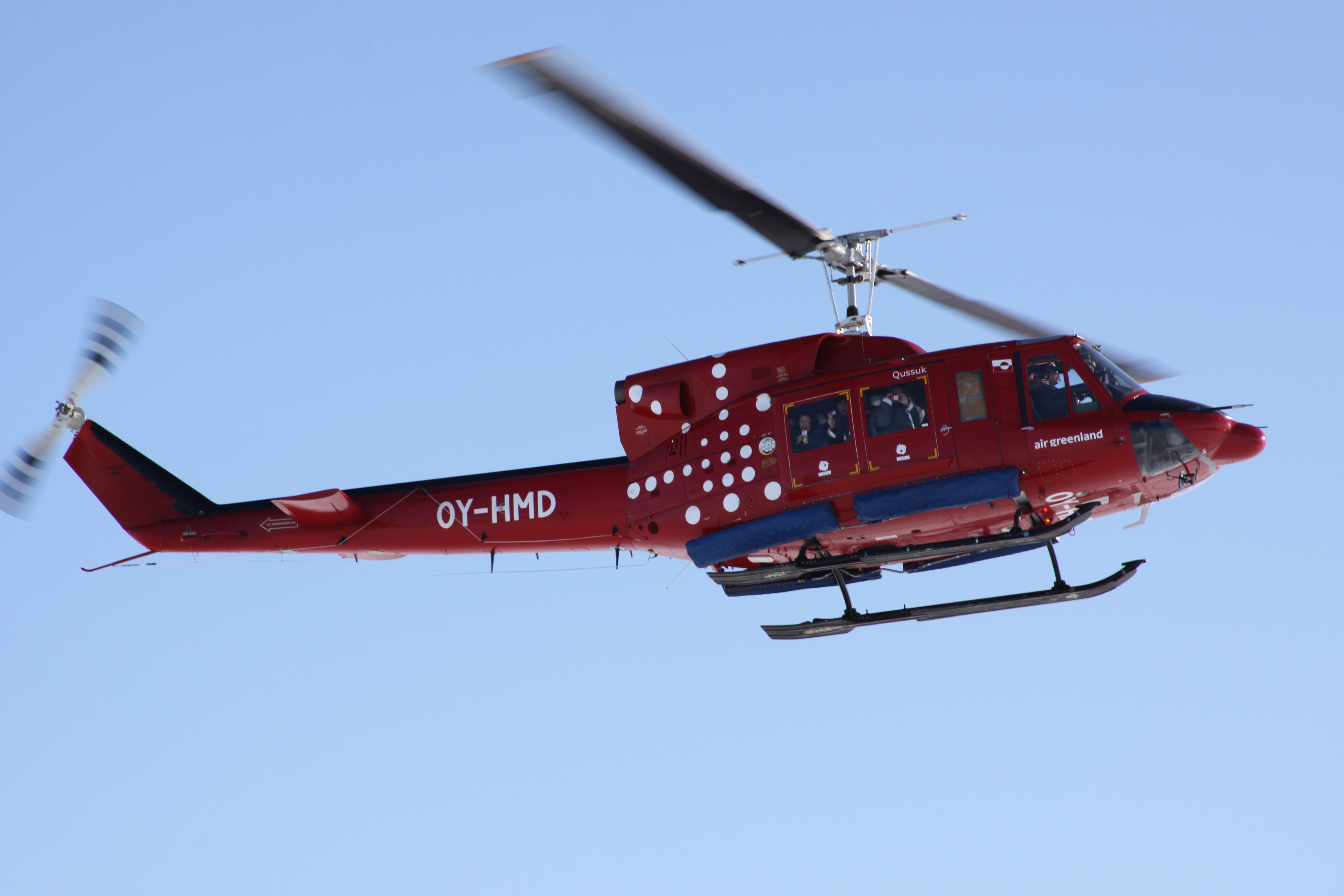 Thule Greenland